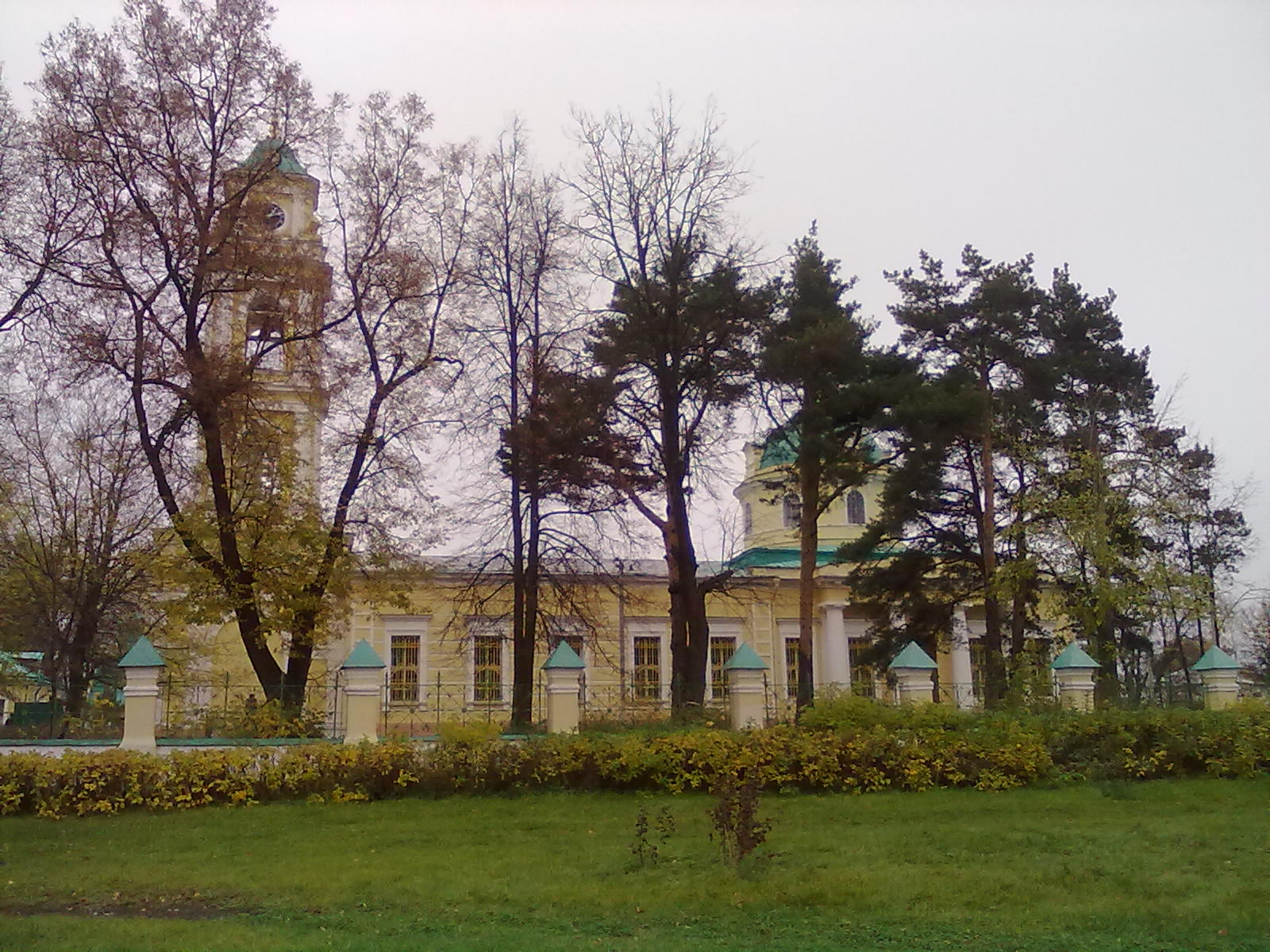 Никольская церковь в Лосино - Петровском.